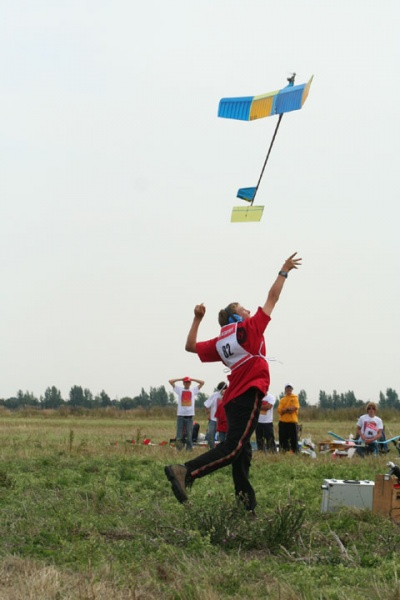 F1P-Freiflugmodell mit Verbrennungsmotor